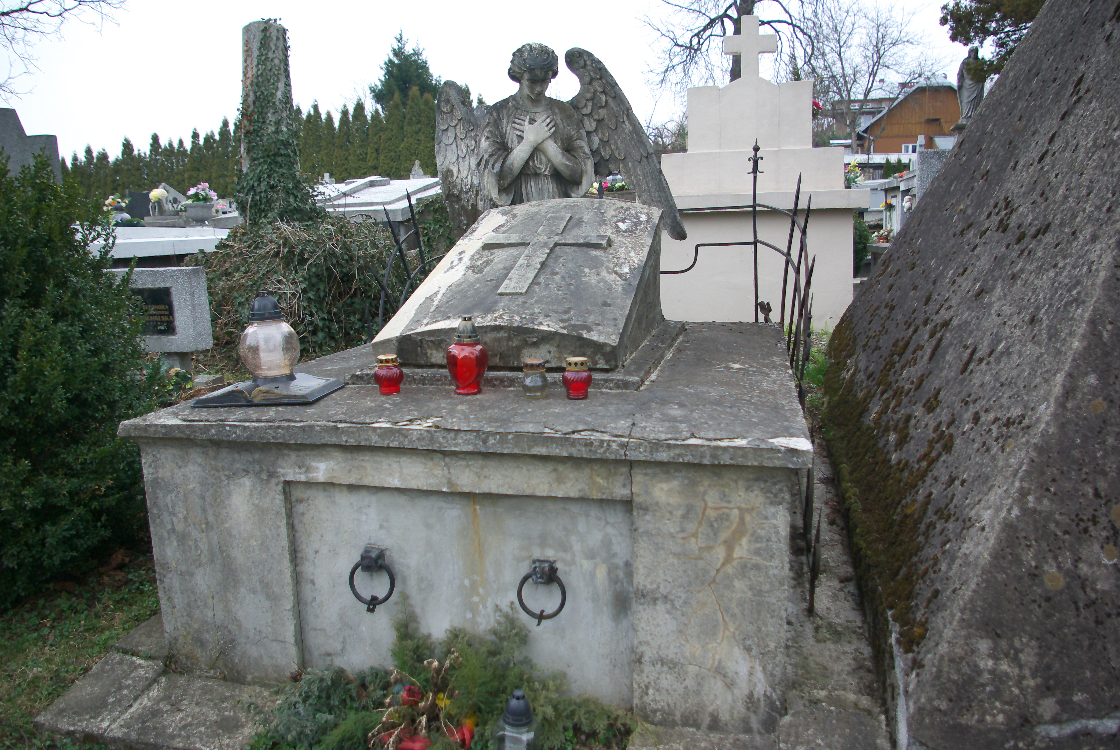 Grobowiec Martynowskich na Cmentarzu Centralnym w Sanoku. Pochowany Franciszek Martynowski (1873-1926).